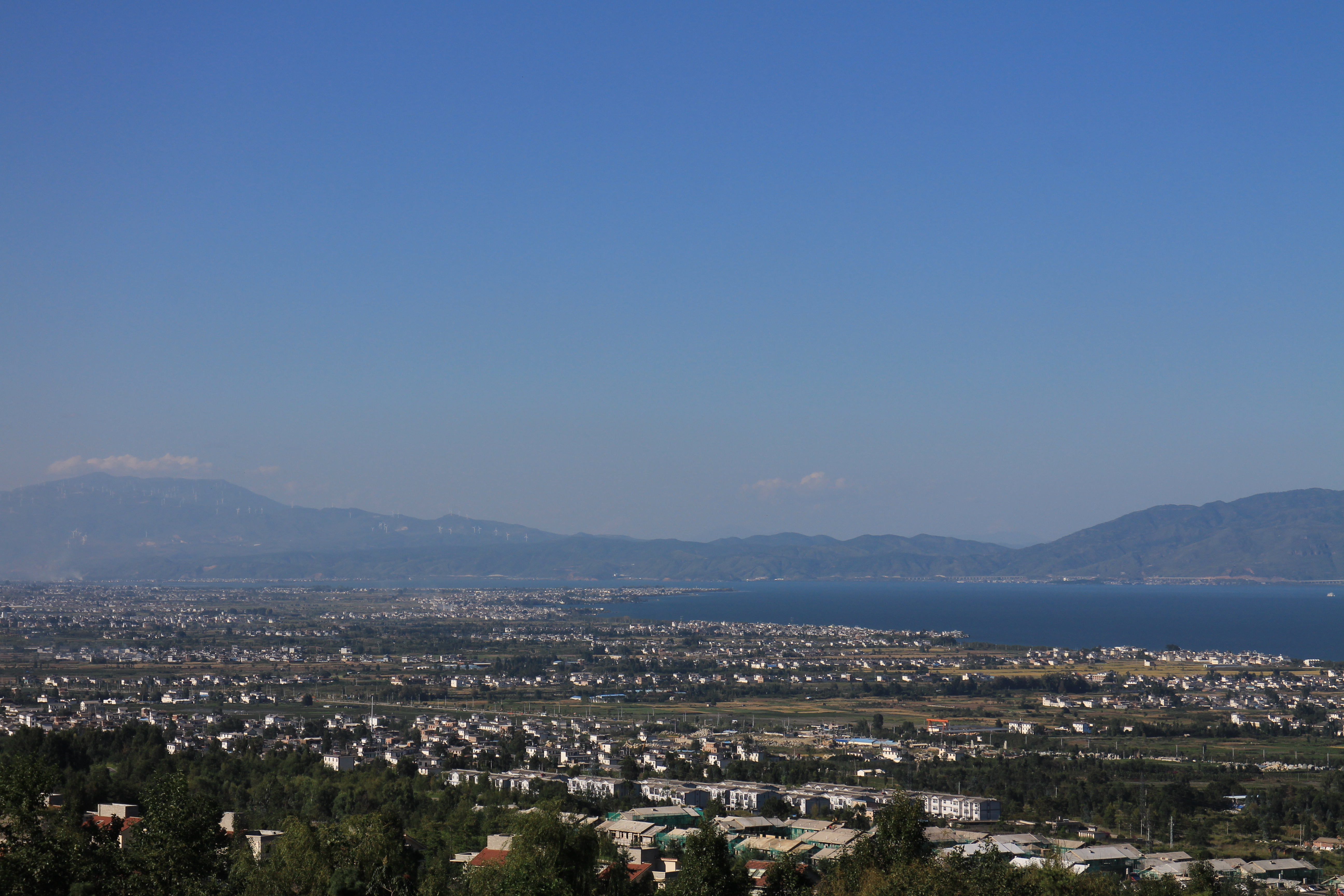 中文（中国大陆）: 阳苴咩故地